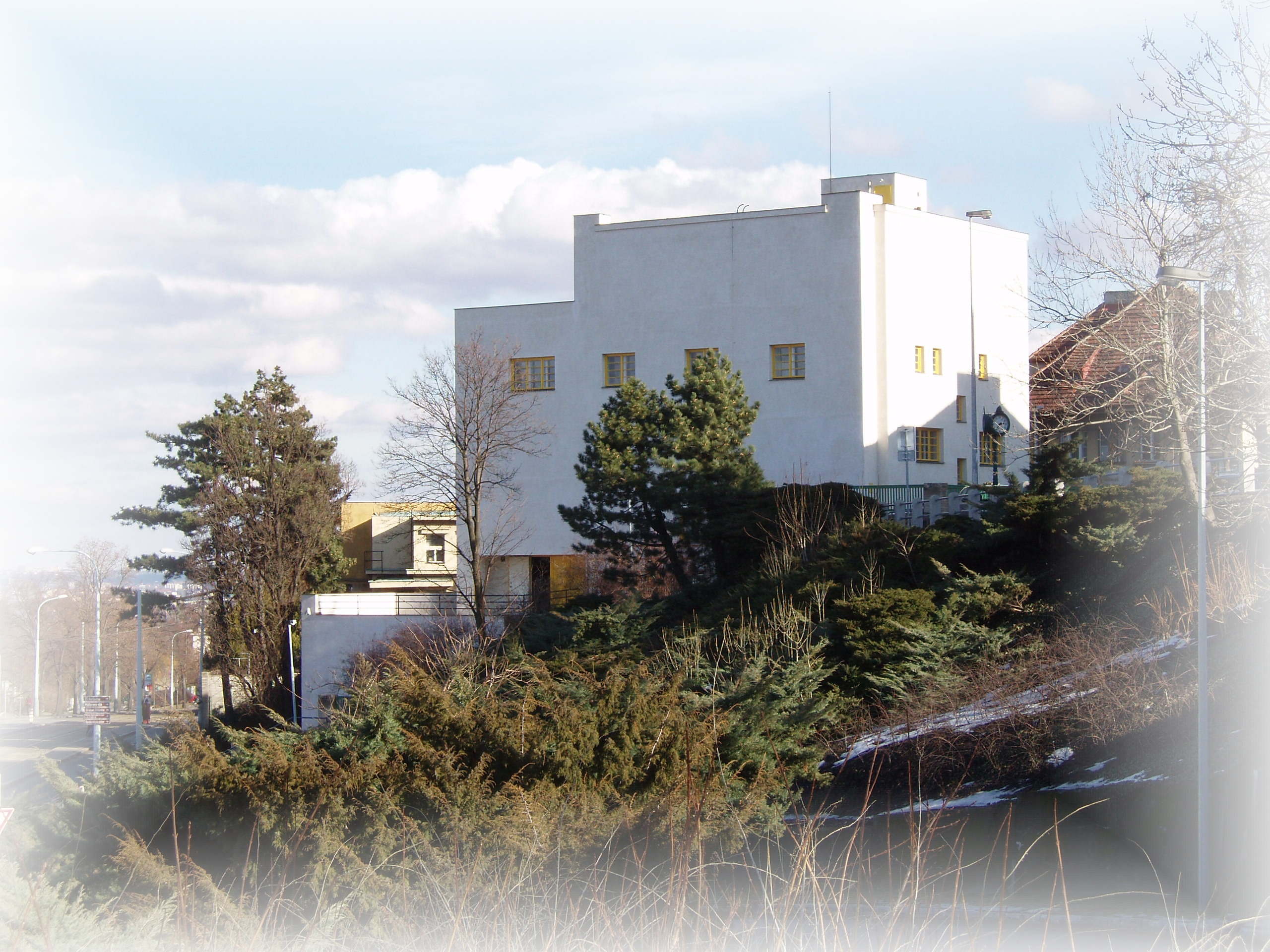 Mullerova vila - Praha, Ceska republika